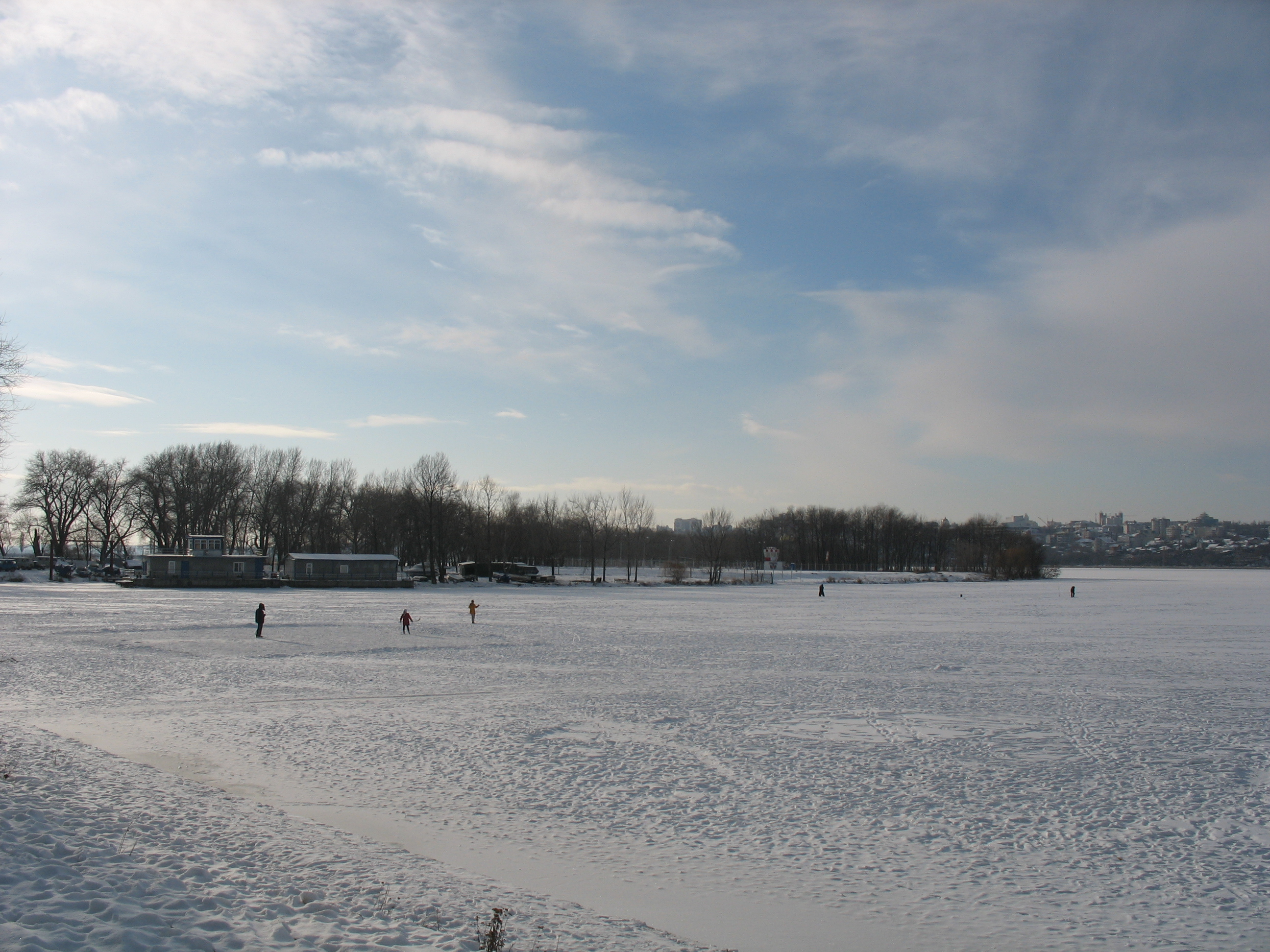 Придаченская дамба с левого берега зимой